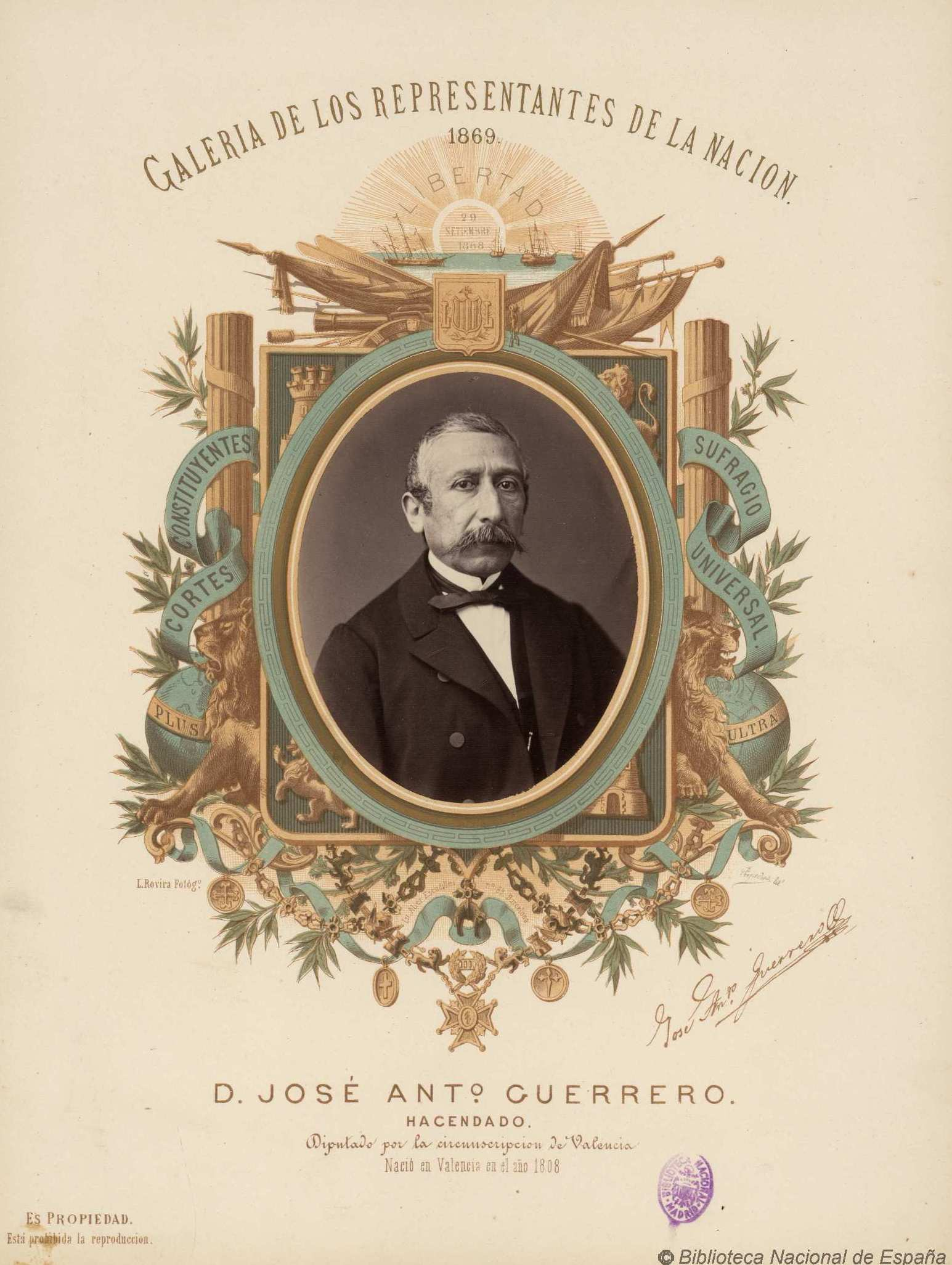 "GALERIA DE LOS REPRESENTANTES DE LA NACION./1869/LIBERTAD/29/SETIEMBRE/1868" "D. JOSÉ ANTº GUERRERO/HACENDADO/Diputado por la circunscripción de Valencia/Nació en Valencia en el año 1808". Fotografía de Leopoldo Rovira; orla litográfica de Magín Pujadas. Biblioteca Nacional de España.